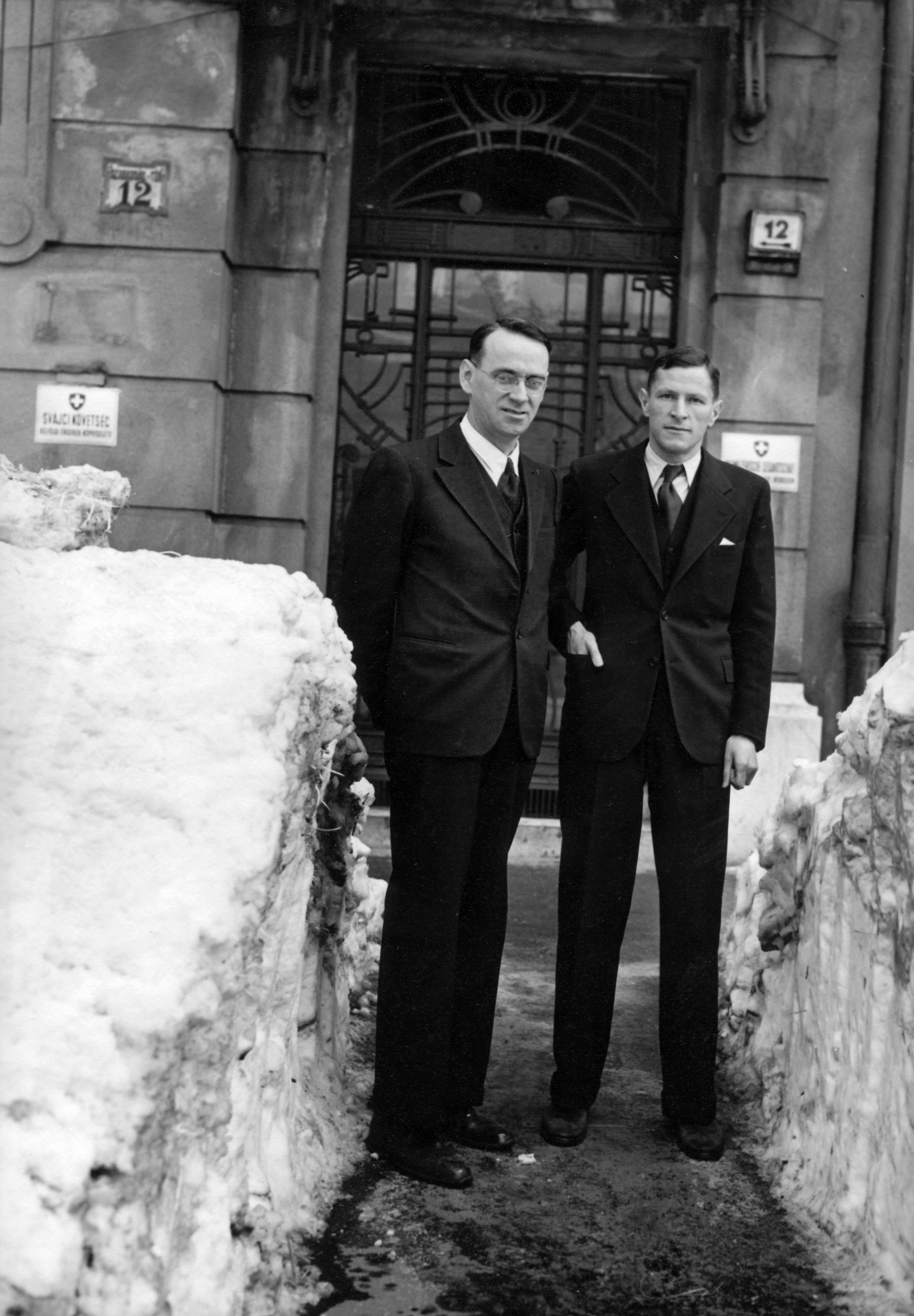 Budapest V. Szabadság tér 12. előtt. Balra Carl Lutz svájci alkonzul, jobbra helyettese: Hans Steiner, háttérben a svájci kezelésbe vett, volt amerikai nagykövetség épületének bejárata. Tags: snow piles